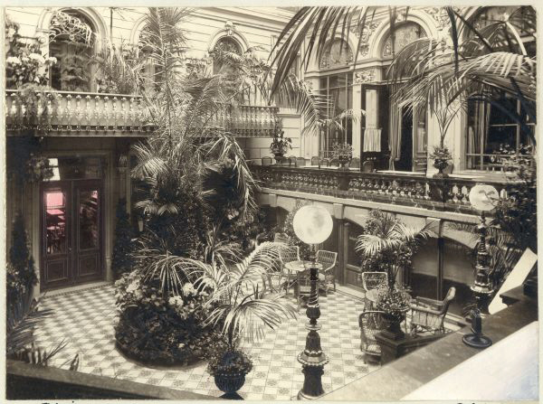 Grand Hotel Haglund, Göteborg. Interior